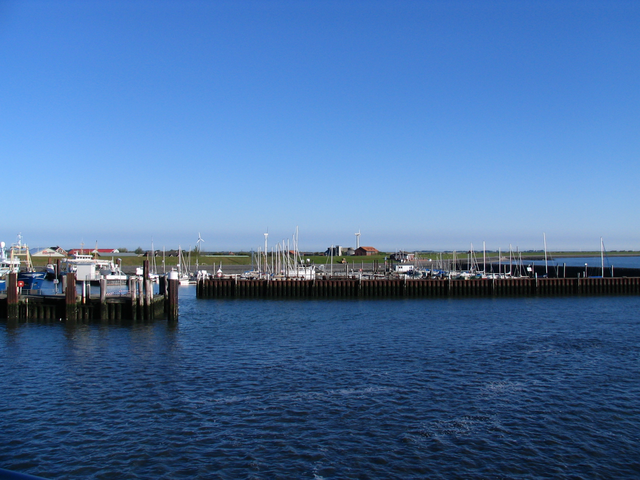 Der Seglerhafen von Wyk auf Föhr